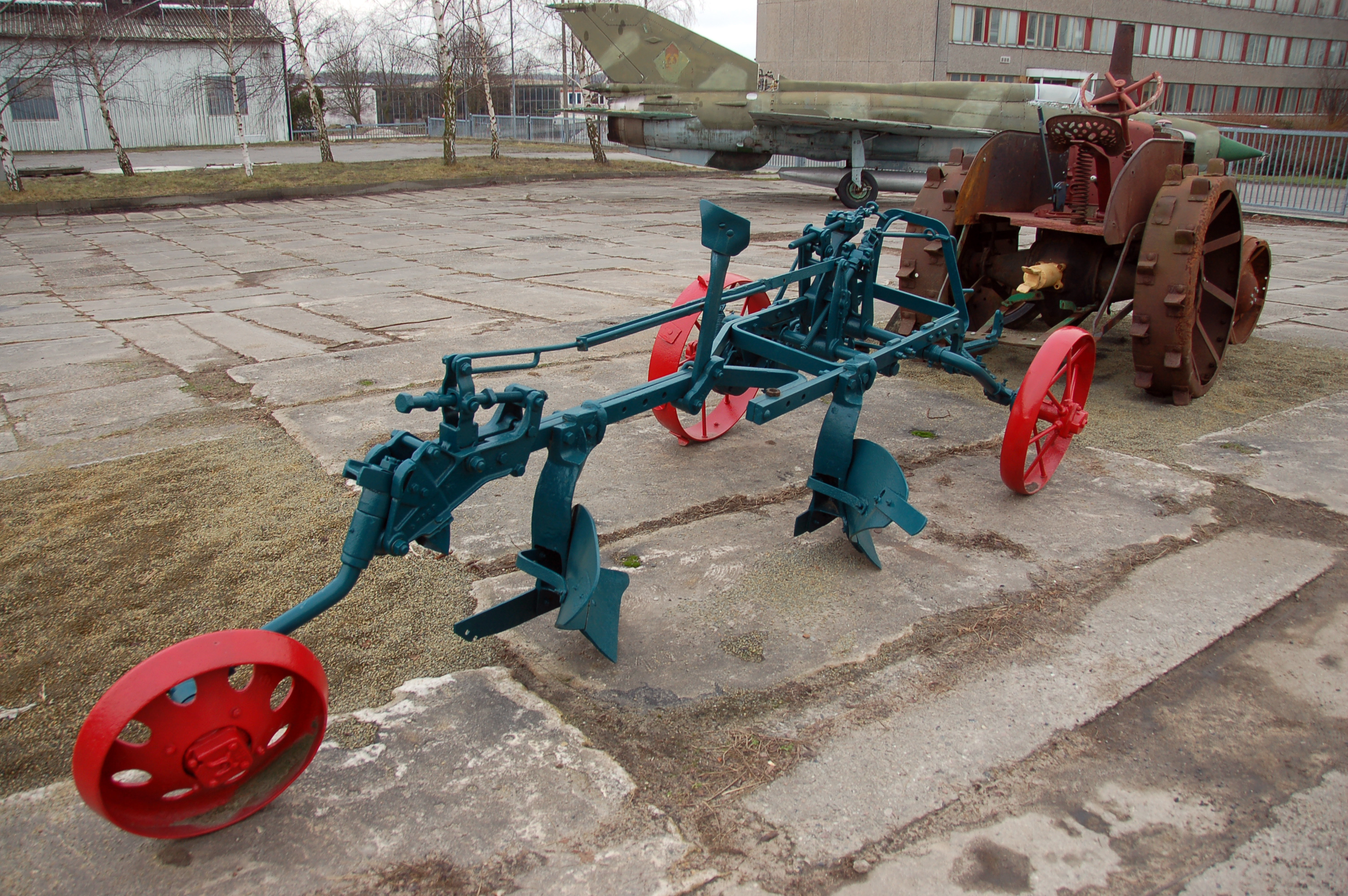 Ein gezogener Zweischarpflug an einem Lanz Bulldog im Technikpark MV in Grimmen